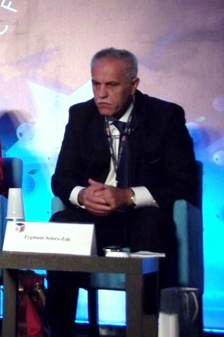 Zygmunt Solorz-Żak. Zdjęcie zrobione podczas XXIII Forum Ekonomicznego w Krynicy-Zdroju.